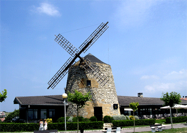 Getxoko Aixerrota errotaren argazkia